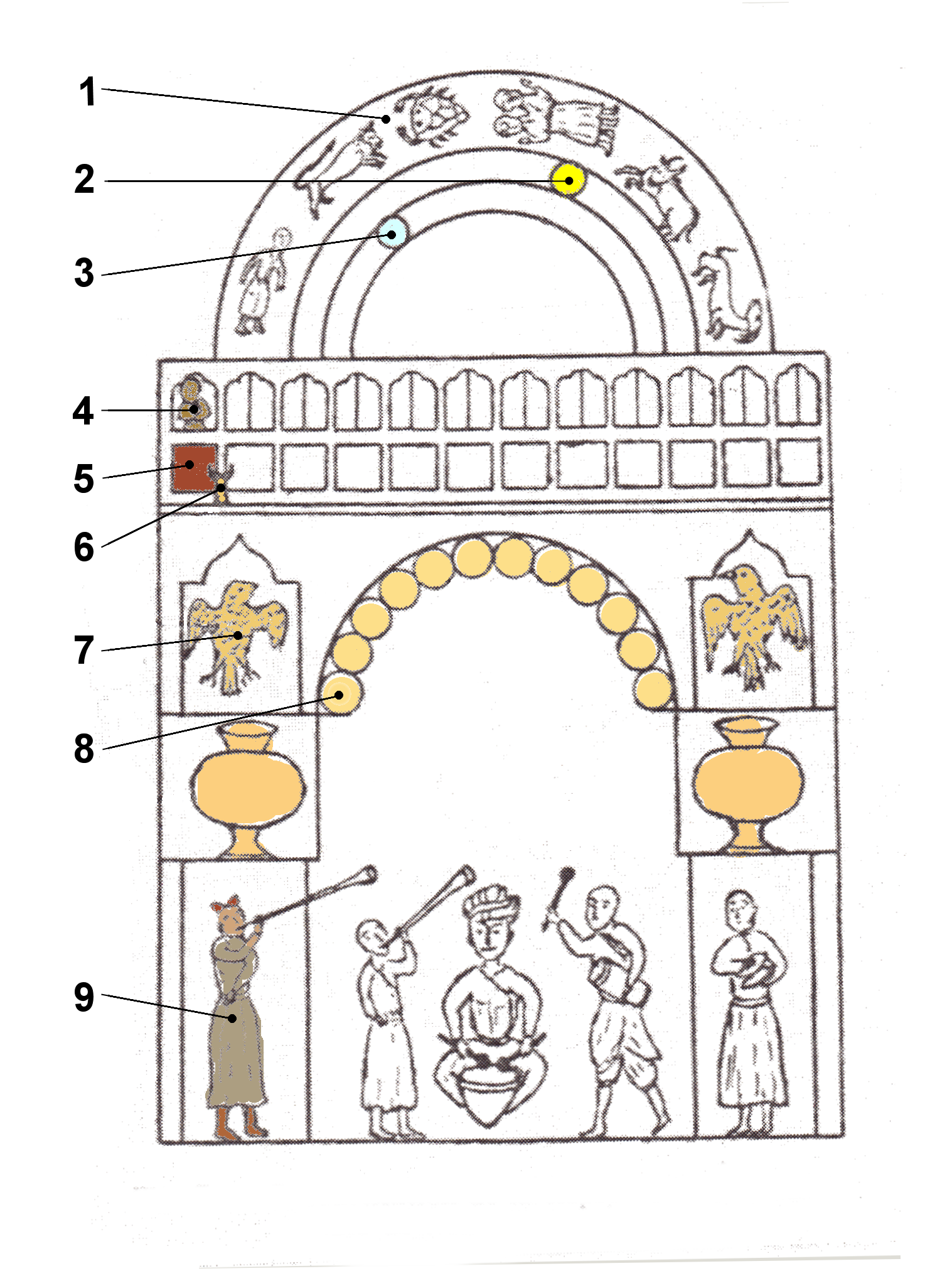 Schéma de repérage des différents éléments de l'horloge.